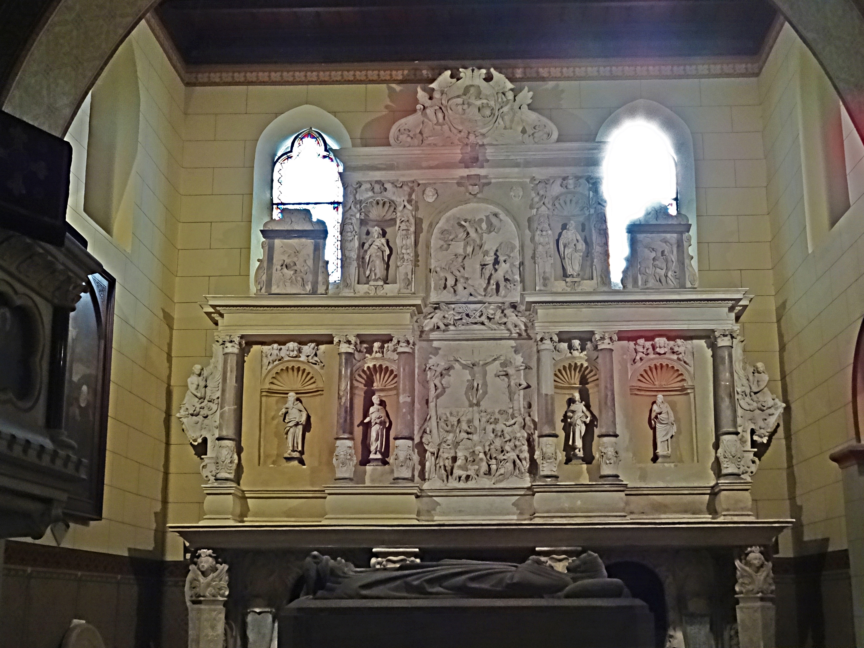 Denkmal der Anna von Alvensleben in St. Gertrud (Neugattersleben)